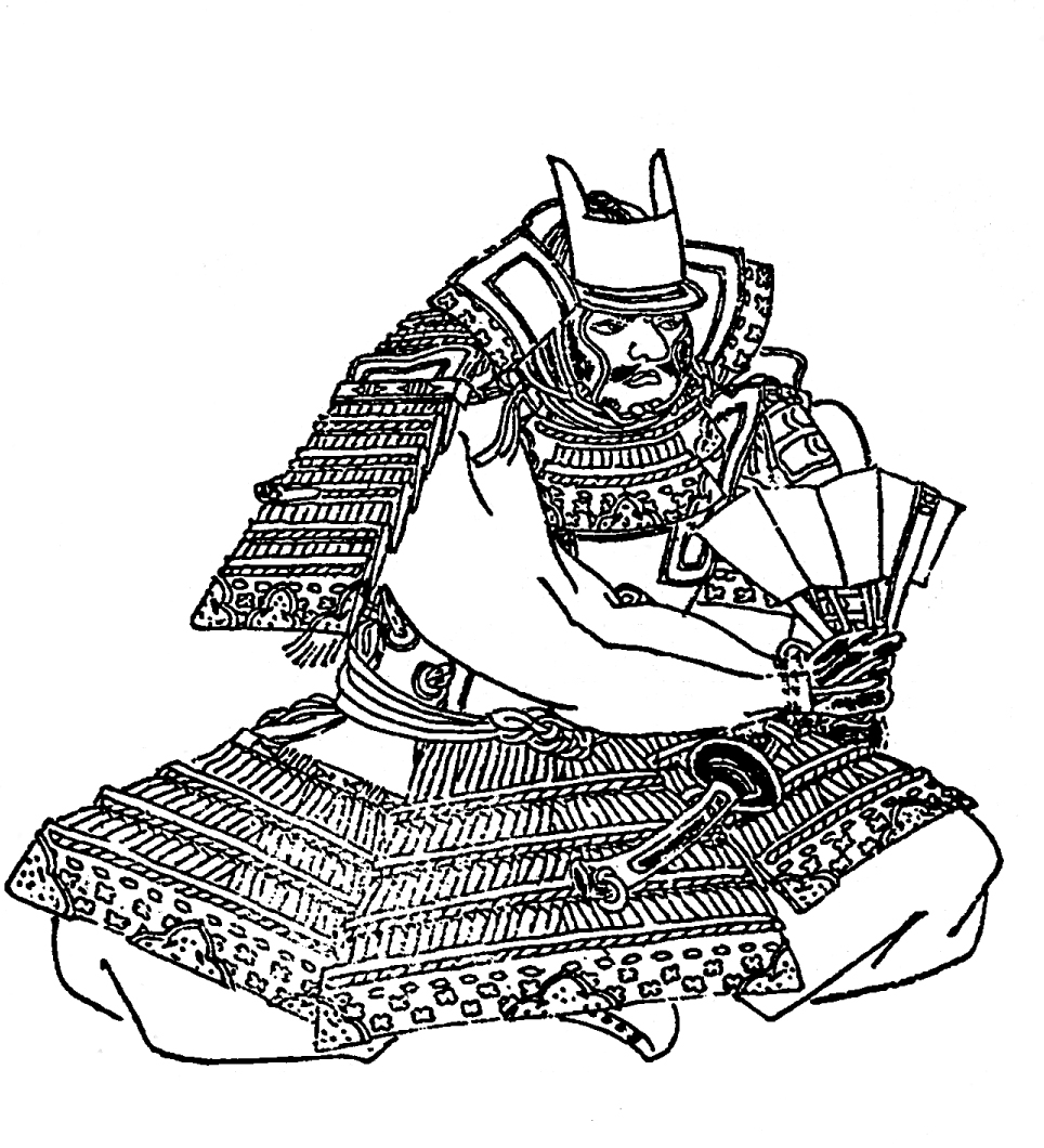 清原武則。平安時代後期の武将。／江戸時代『前賢故実』より。画：菊池容斎